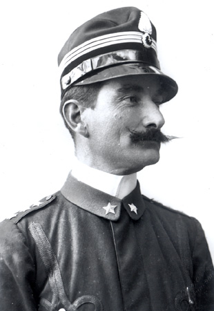 Это изображение было использовано для иллюстрирования статьи «Каприлли» опубликованной в двенадцатом томе «Военной энциклопедии», который был издан книгоиздательским товариществом И. Д. Сытина в 1913 году в столице Российской империи городе Санкт-Петербурге. Подробное описание к этой картинке можно прочесть в указанной статье.